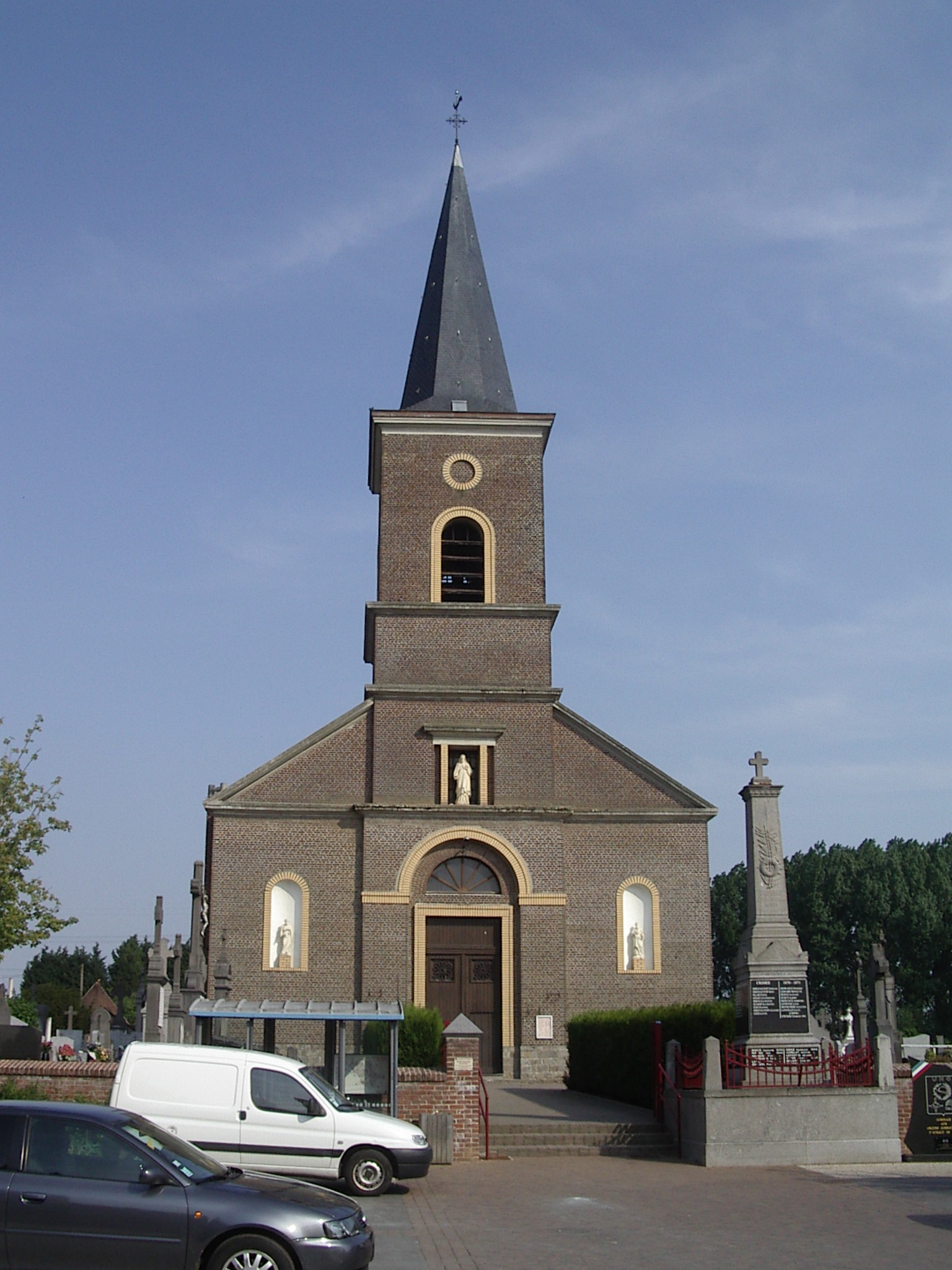 Eglise de Coutiches (France, Nord)